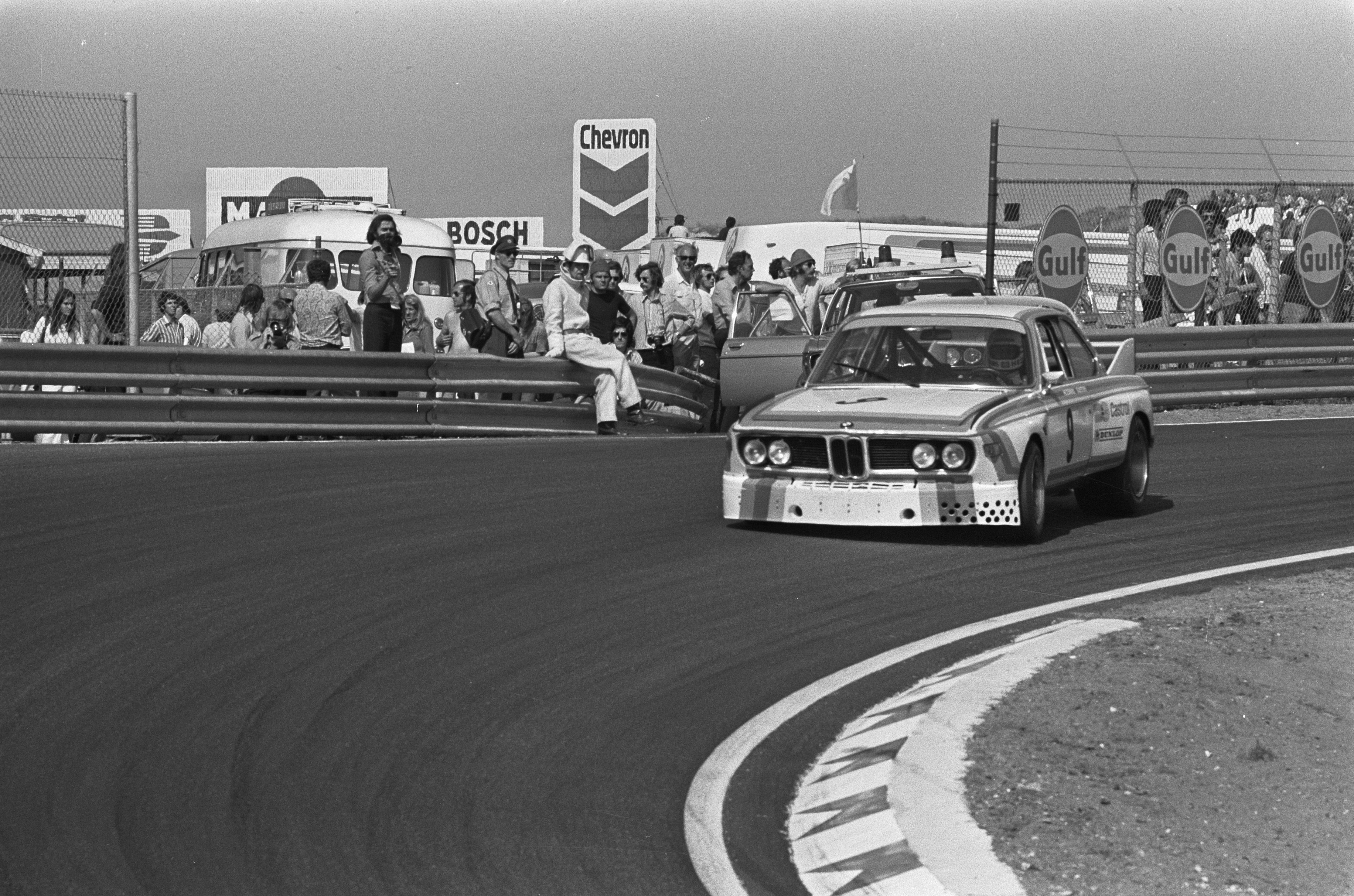 Collectie / Archief : Fotocollectie Anefo Reportage / Serie : [ onbekend ] Beschrijving : Zandvoort Trophy toerwagens, groep II, T. Hezemans in aktie Datum : 12 augustus 1973 Locatie : Noord-Holland, Zandvoort Trefwoorden : autoraces Persoonsnaam : Hezemans, T. Fotograaf : Punt, […] / Anefo Auteursrechthebbende : Nationaal Archief Materiaalsoort : Negatief (zwart/wit) Nummer archiefinventaris : bekijk toegang 2.24.01.05 Bestanddeelnummer : 926-6026